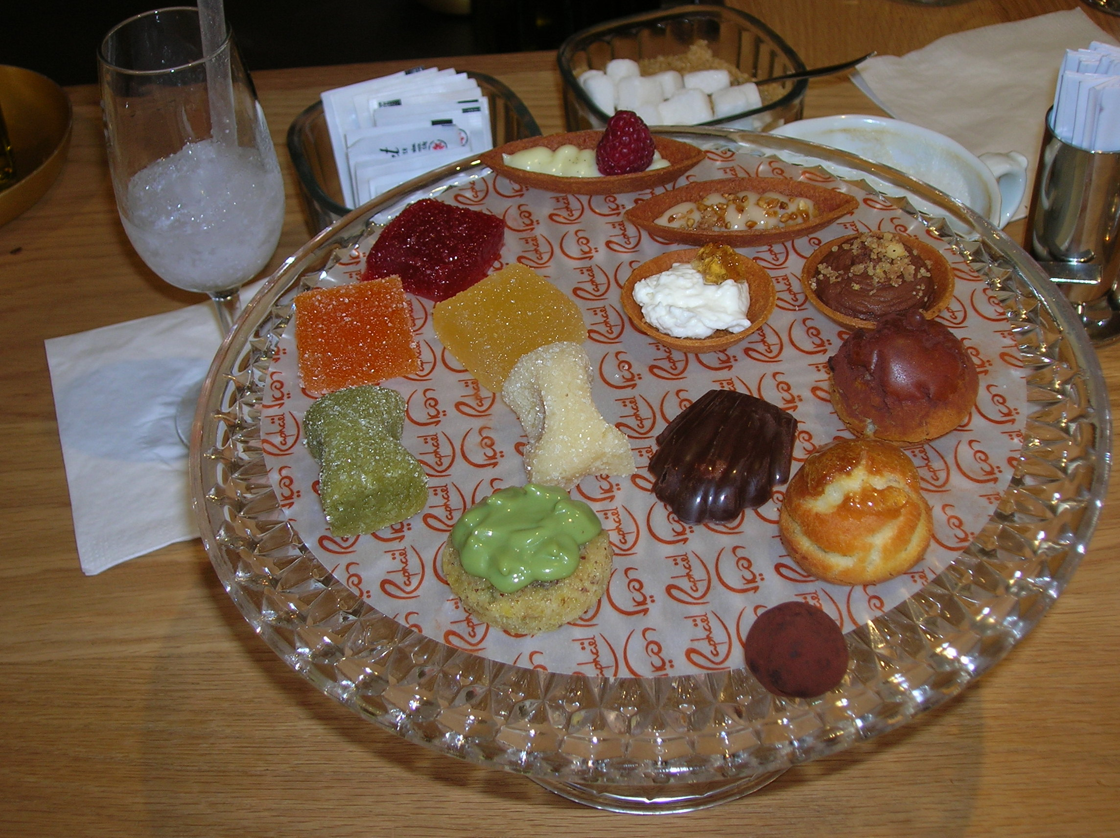 מבחר פטיפורים תוצרת הבית